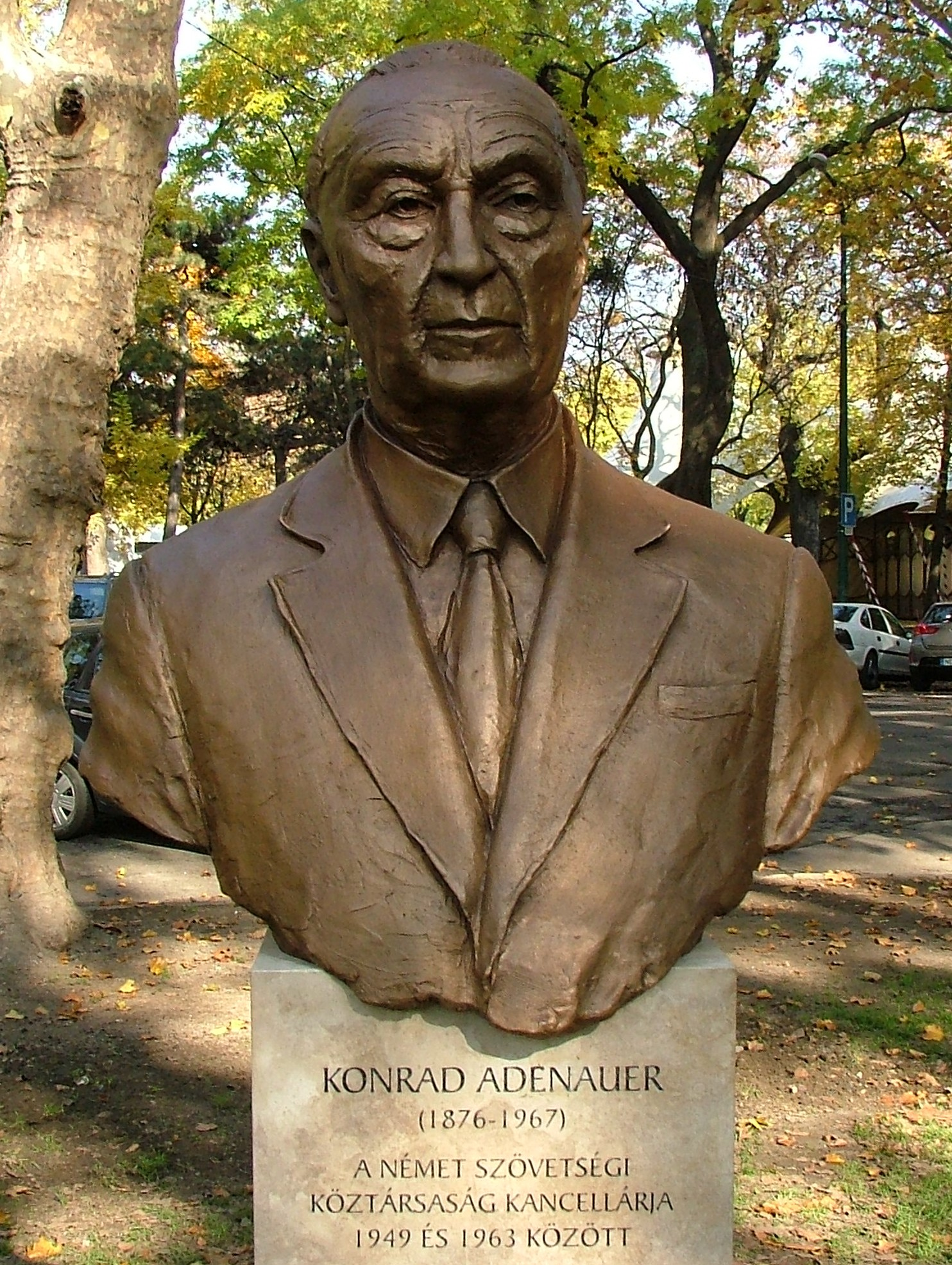 Juha Richárd: Konrad Adenauer mellszobra (Budapest, XIV. kerület, Városliget, Winston Churchill sétány). A mellszobor hátán Juha Richárd szignója és a 2015 évszám szerepel.